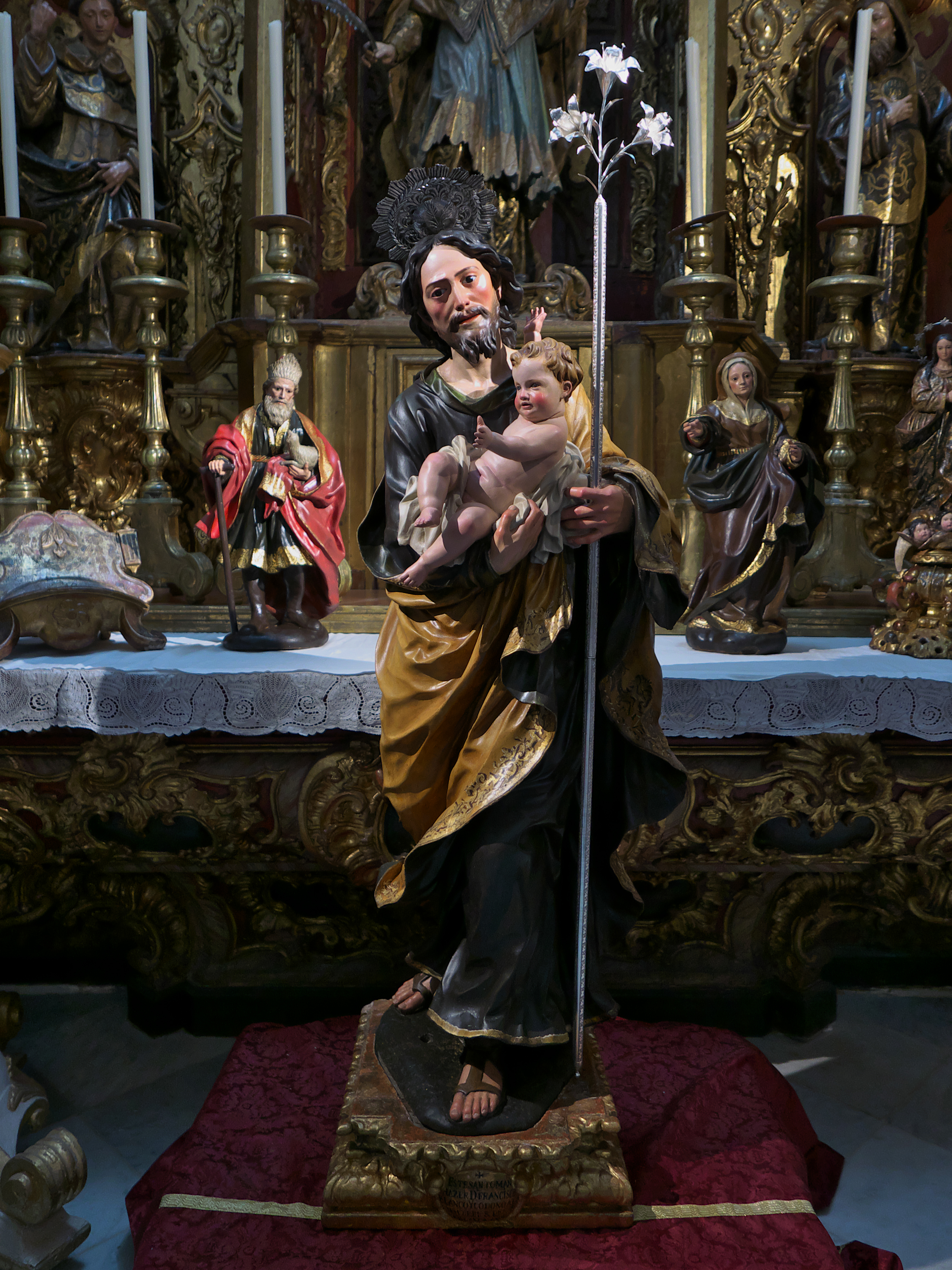 Iglesia de Santa María la Blanca (Sevilla). Talla de Luisa Roldán, La Roldana (1677).